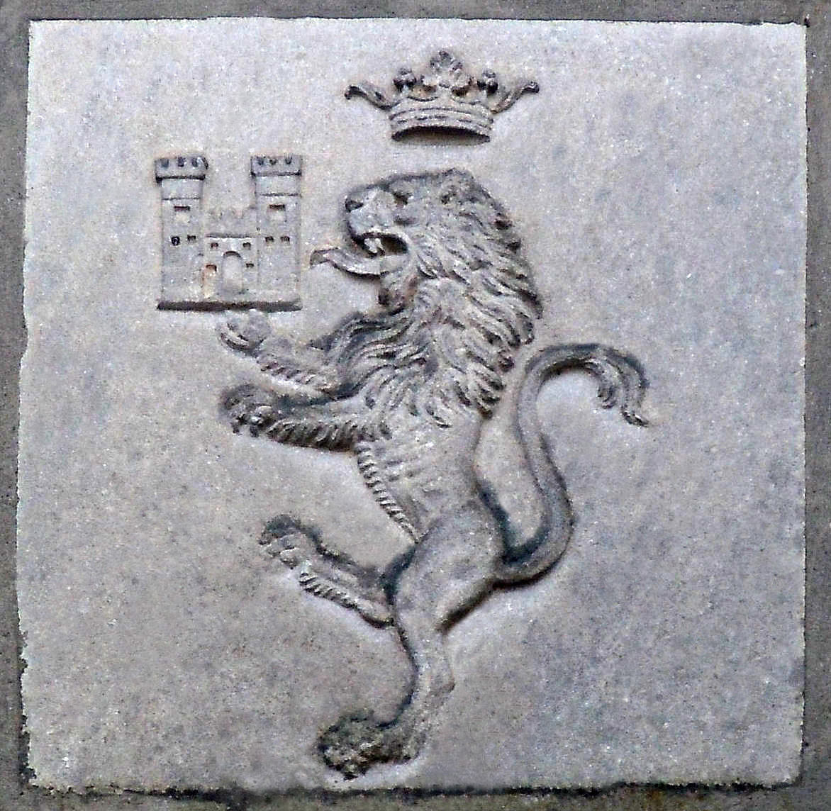 Casatico di Marcaria, Stemma della famiglia Castiglione.